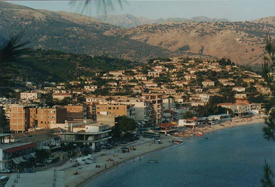 Beschreibung: Das Städtchen Himara an der Küste des Ionischen Meers in Albanien. In der Bildmitte befindet sich das Zentrum des Orts mit der Promenade, diversen Restaurants und Läden. Quelle: August 2001, im Abendlicht Fotograf: Lars Haefner Lizenzstatus: GNU FDL